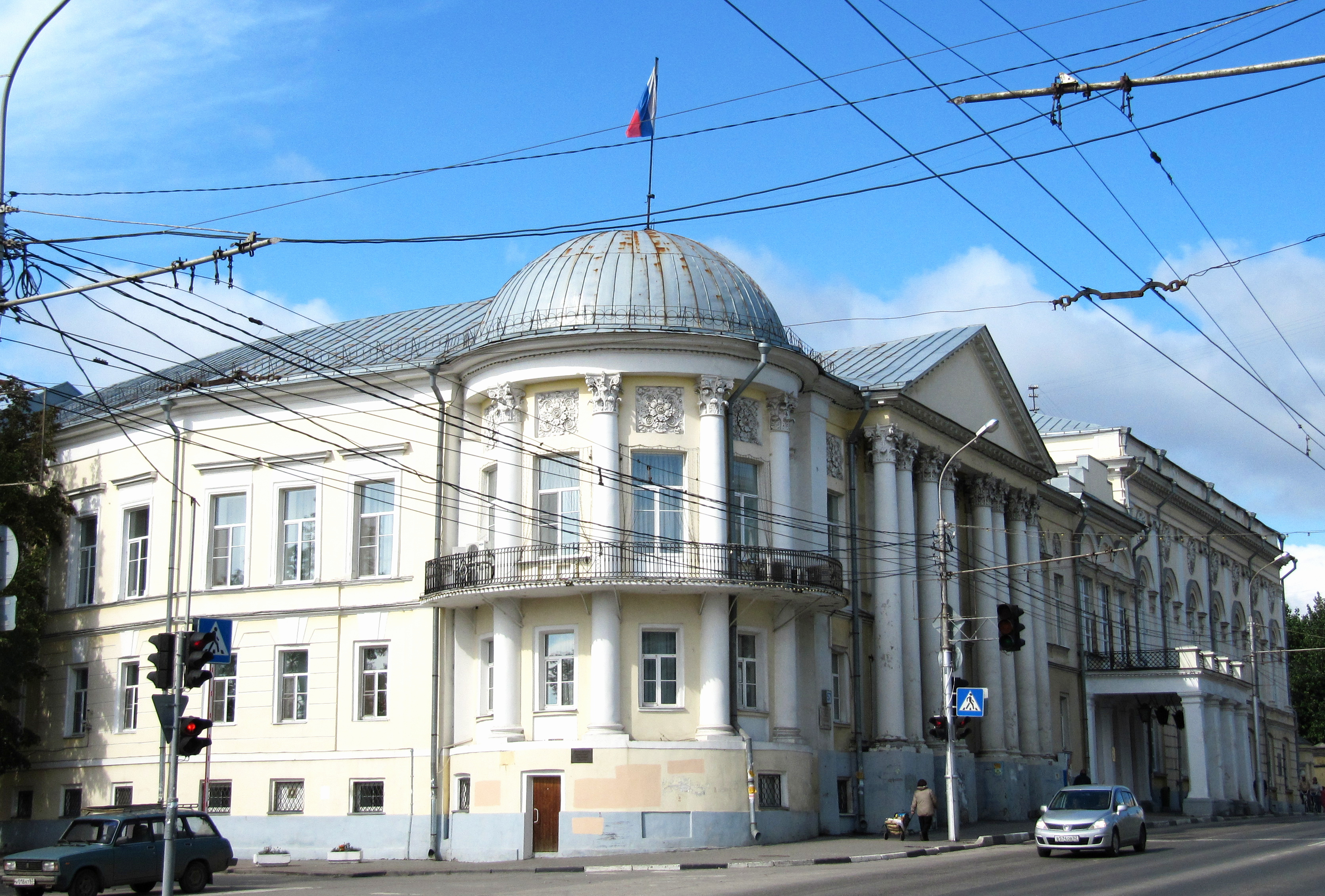 Здание Благородного собрания (Дворянское собрание) (Рязанская область, Рязань, Ленина (б. Астраханская) улица, 57/50)